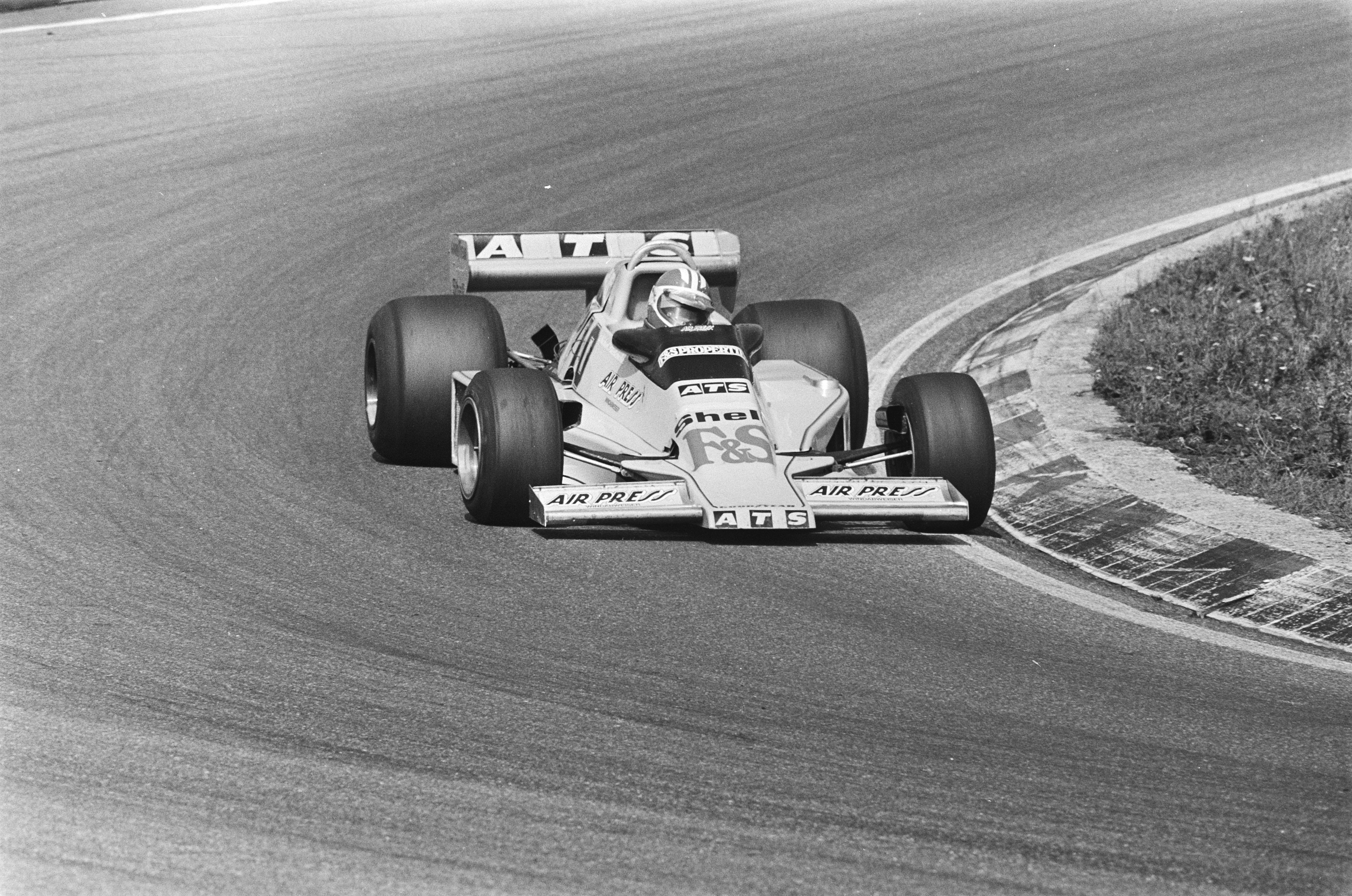 Collectie / Archief : Fotocollectie Anefo Reportage / Serie : [ onbekend ] Beschrijving : Michael Bleekemolen test ATS-wagen voor Grand Prix op Zandvoort; Bleekemolen in actie Datum : 15 augustus 1978 Locatie : Noord-Holland, Zandvoort Trefwoorden : autoraces Fotograaf : Verhoeff, Bert / Anefo Auteursrechthebbende : Nationaal Archief Materiaalsoort : Negatief (zwart/wit) Nummer archiefinventaris : bekijk toegang 2.24.01.05 Bestanddeelnummer : 929-8578